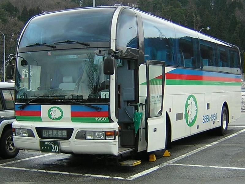 登録番号 練馬200か・20 西武バス練馬営業所所属 車番1960 高速用車両 （各系統で共通運用） 2004年2月15日 北陸自動車道越中境S.Aにて撮影